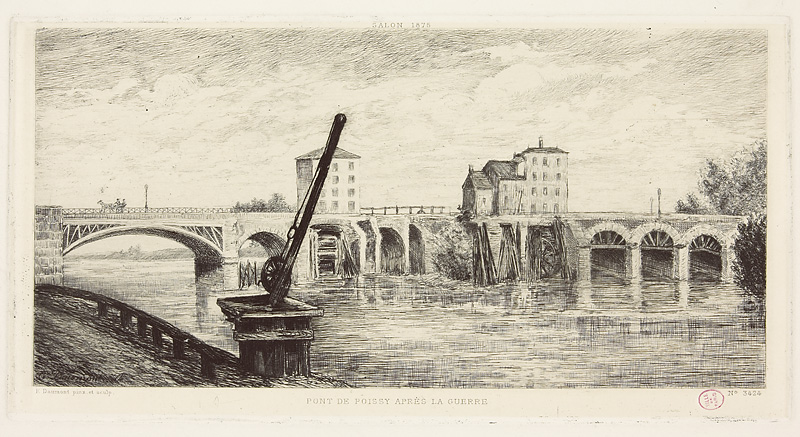 Eau-forte sur papier, vue du pont de Poissy et de son arche marinière (arch. : Antoine-Rémy Polonceau), des moulins.